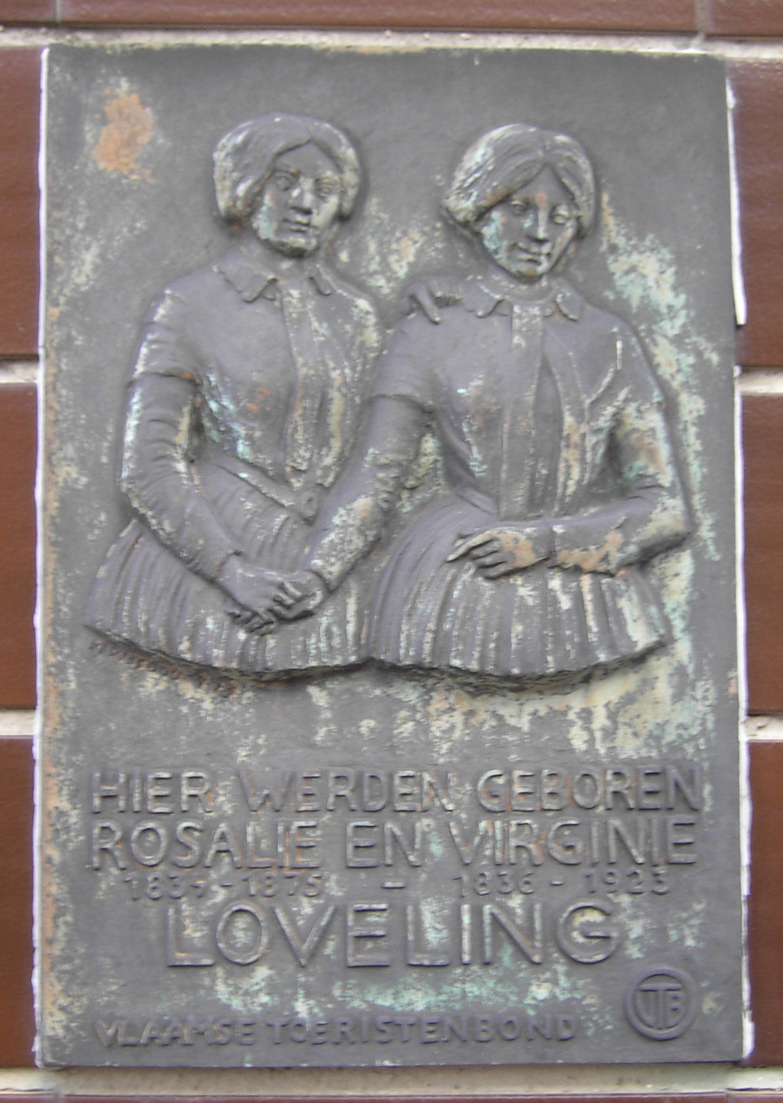 Nevele - Gedenkplaat aan het geboortehuis van de schrijfsters Virginie Loveling (1836-1923) en Rosalie Loveling (1834-1875). Waren de tanten van schrijver Cyriel Buysse